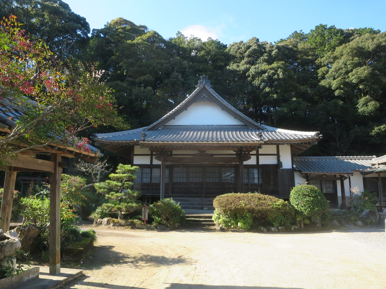 広忠寺（岡崎市桑谷町）